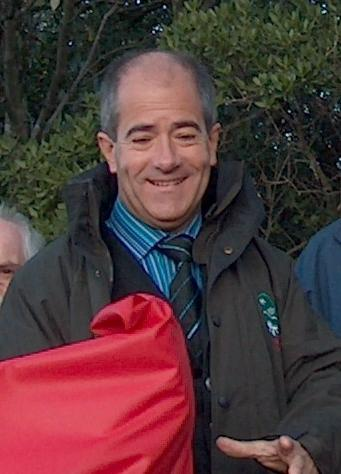 Christian Bourquin, lors de l'inauguration d'un panneau de signalisation en occitan, dans les Fenouillèdes.